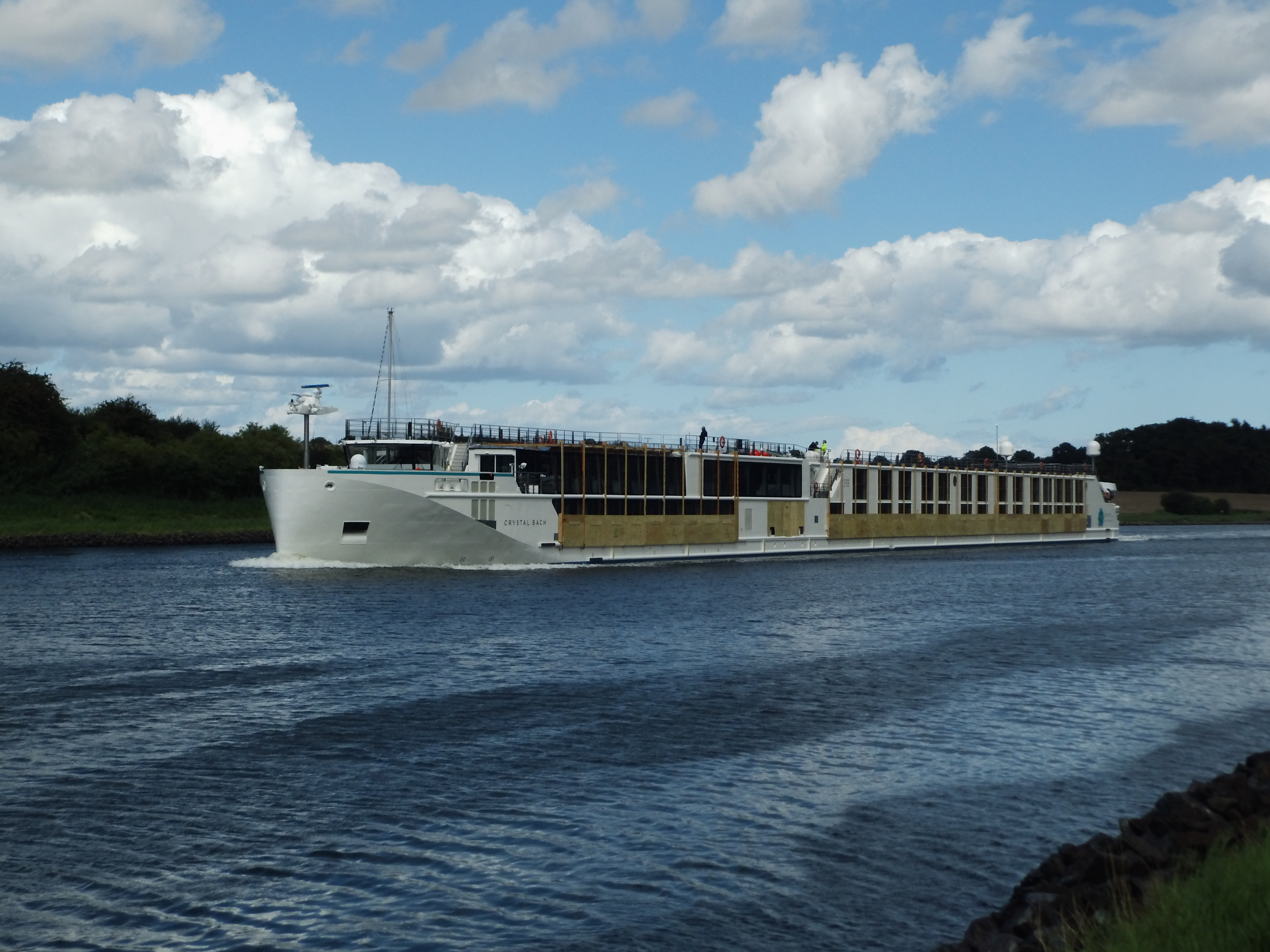 Crystal Bach in Kiel Canal.